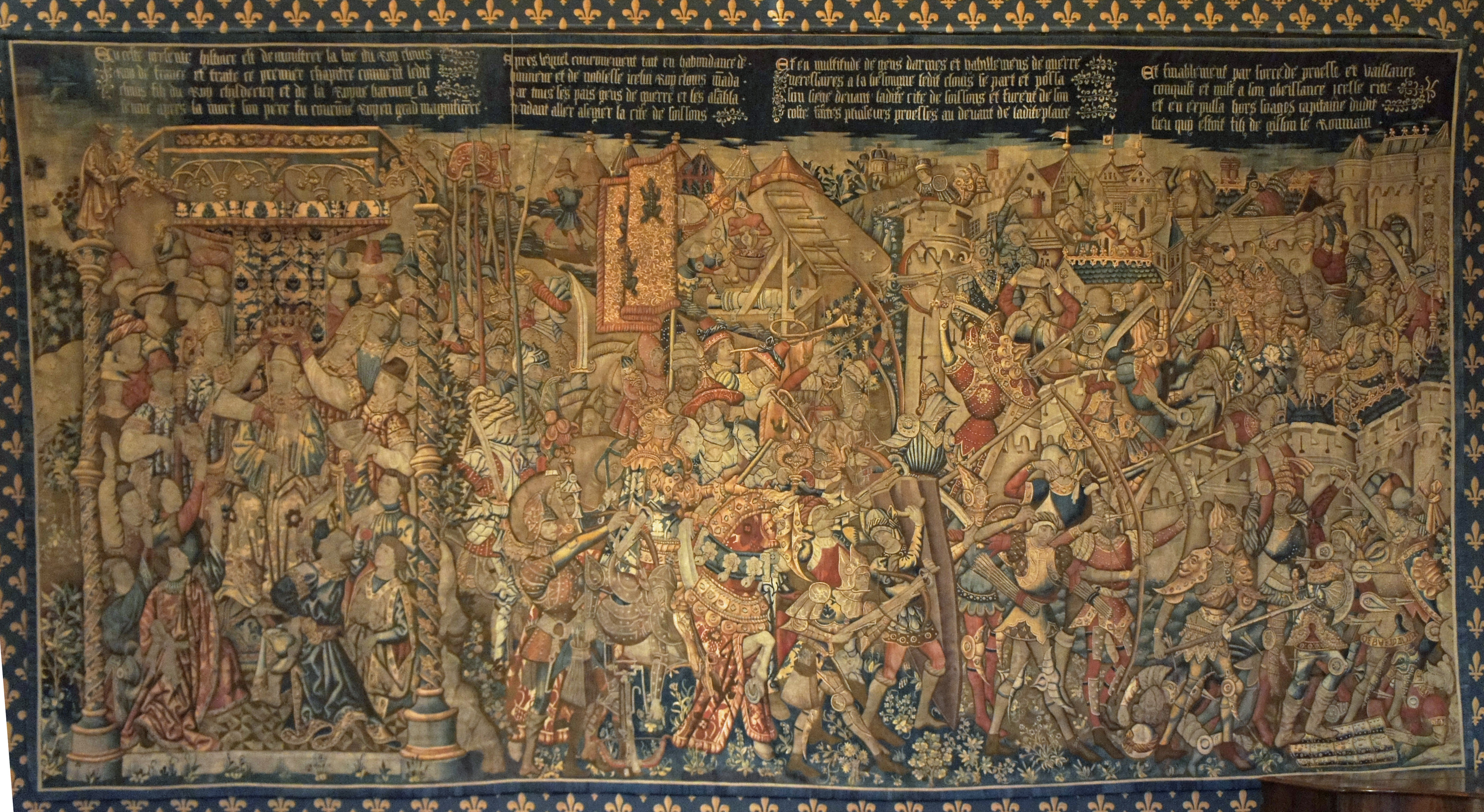 L'histoire_du_fort_roy_Clovis, tapisserie de 1450-1460 d'Arras ou Tournais en laine et soie, don du cardinal de Lorraine en 1573. Elle représente le couronnement de Clovis puis le siège de Soissons, notez les armes du roi : de trois crapauds.